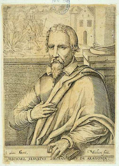 Christoffel van Sichem, Retrato de Miguel Servet, buril. Inscripción; Michael Servetus Hispanus de Aragonia. Firmado CVSichem fecit